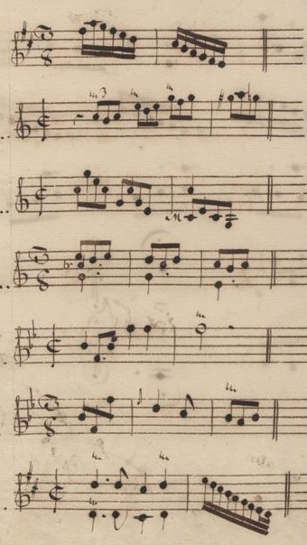 Table du volume XII des manuscrits de Venise (incipit des sonates 1 à 7, K. 484 à 490).